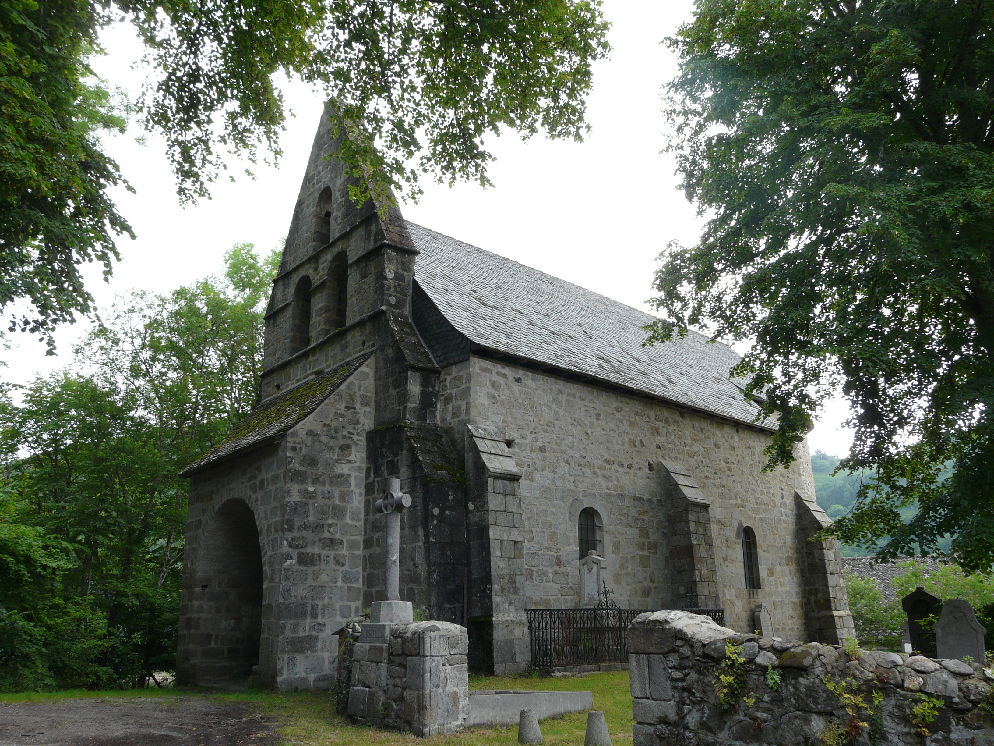 La chapelle des Manants, ancien prieuré de Port-Dieu ; Confolent-Port-Dieu, Corrèze, France.